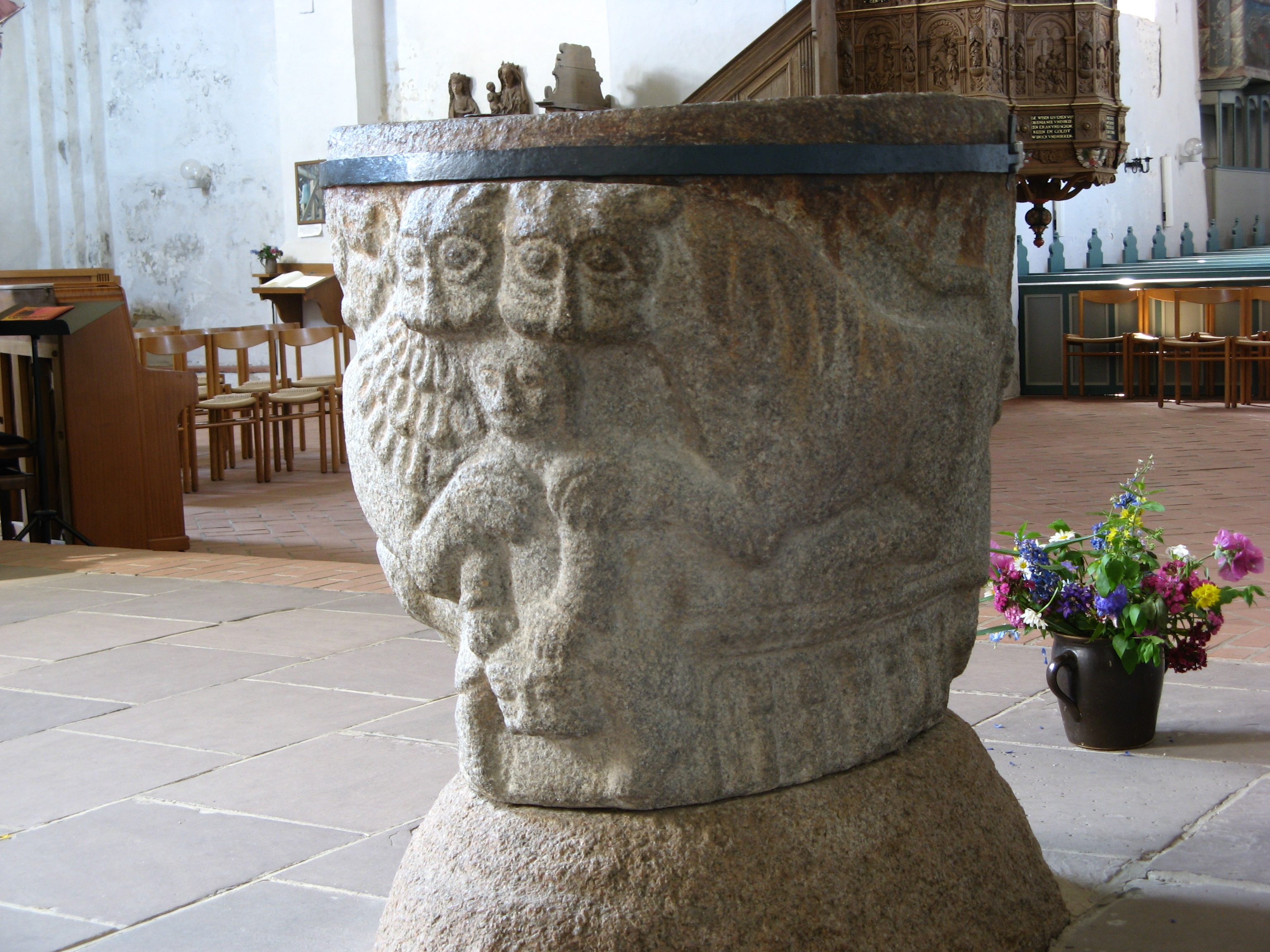 Taufstein der Kirche St. Johannis in Nieblum